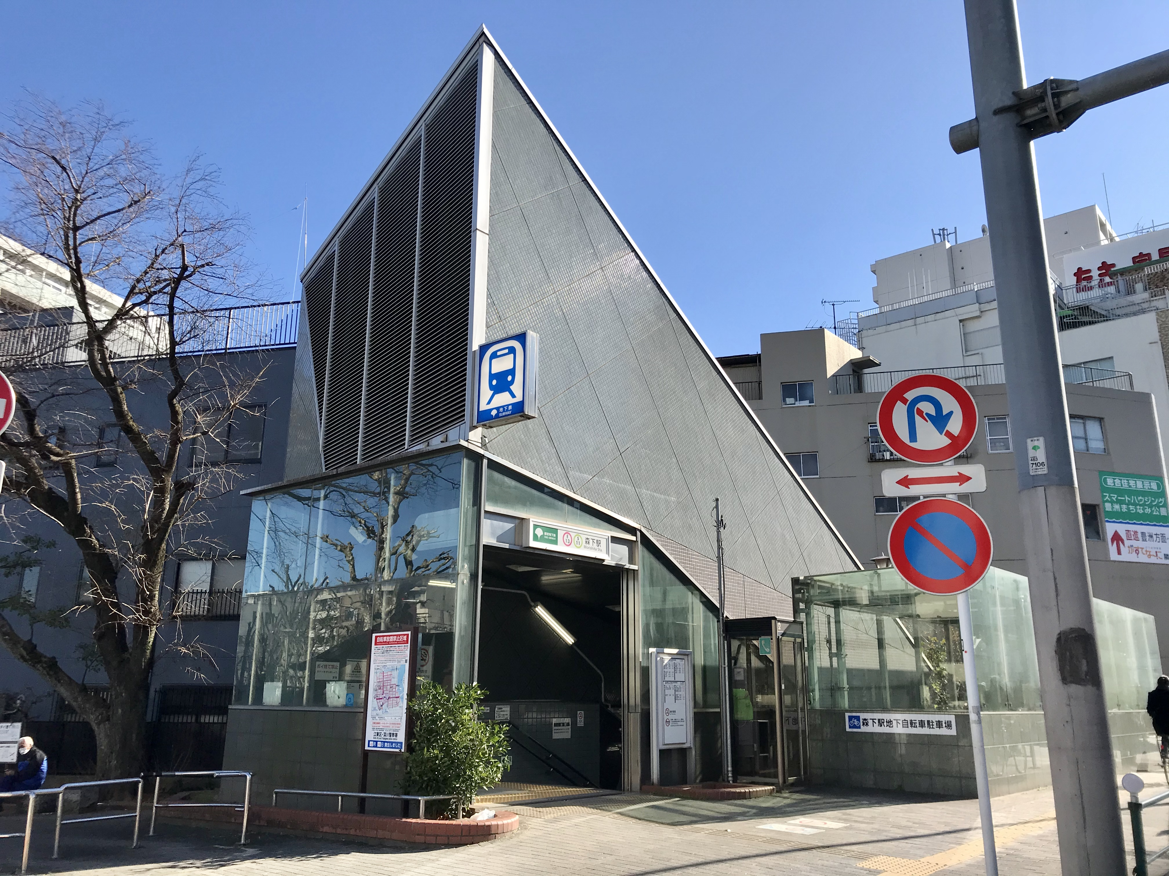 都営地下鉄新宿線・大江戸線森下駅A5番出入口